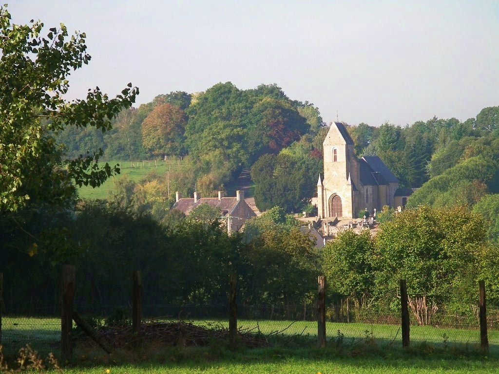 Eglise des Trois-Monts (Calvados)